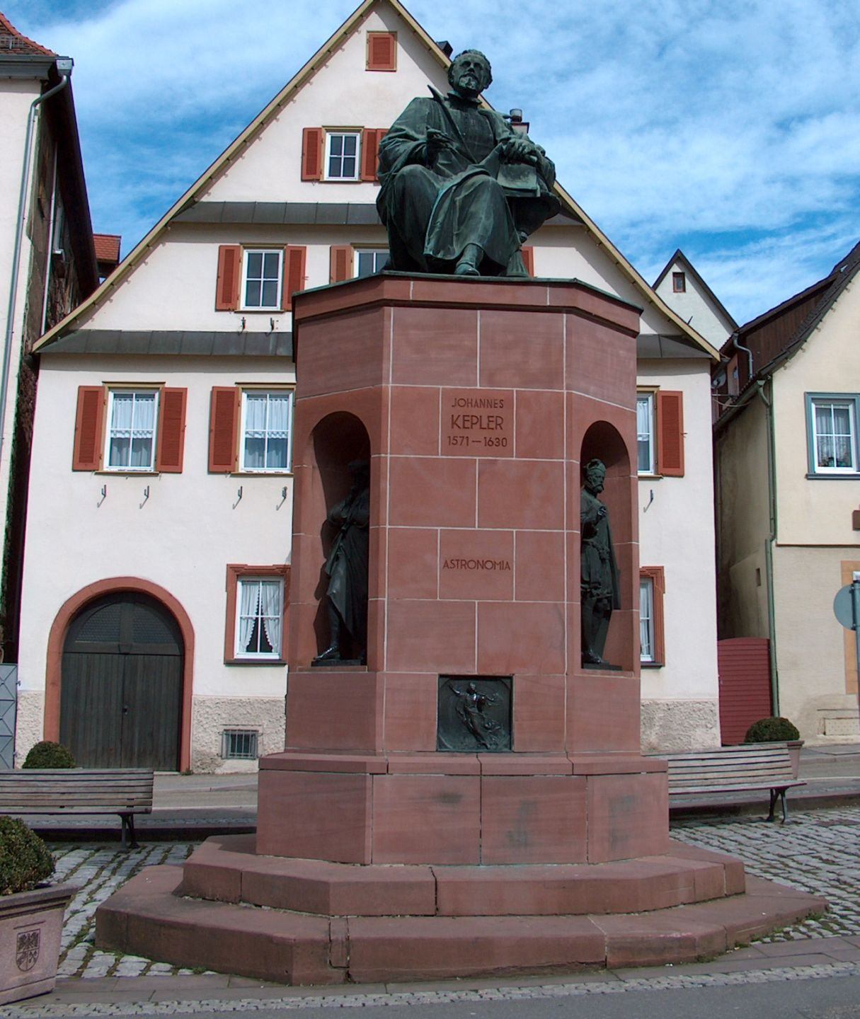 Bildbeschreibung: Keplerdenkmal auf dem Marktplatz Weil der Stadt, errichtet 1870, im Hintergrund das Stadtmuseum Quelle: selbst erstellt Fotograf: MarkusHagenlocher Datum: 2. April 2006